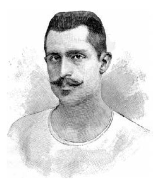 Olympiasieger 1896